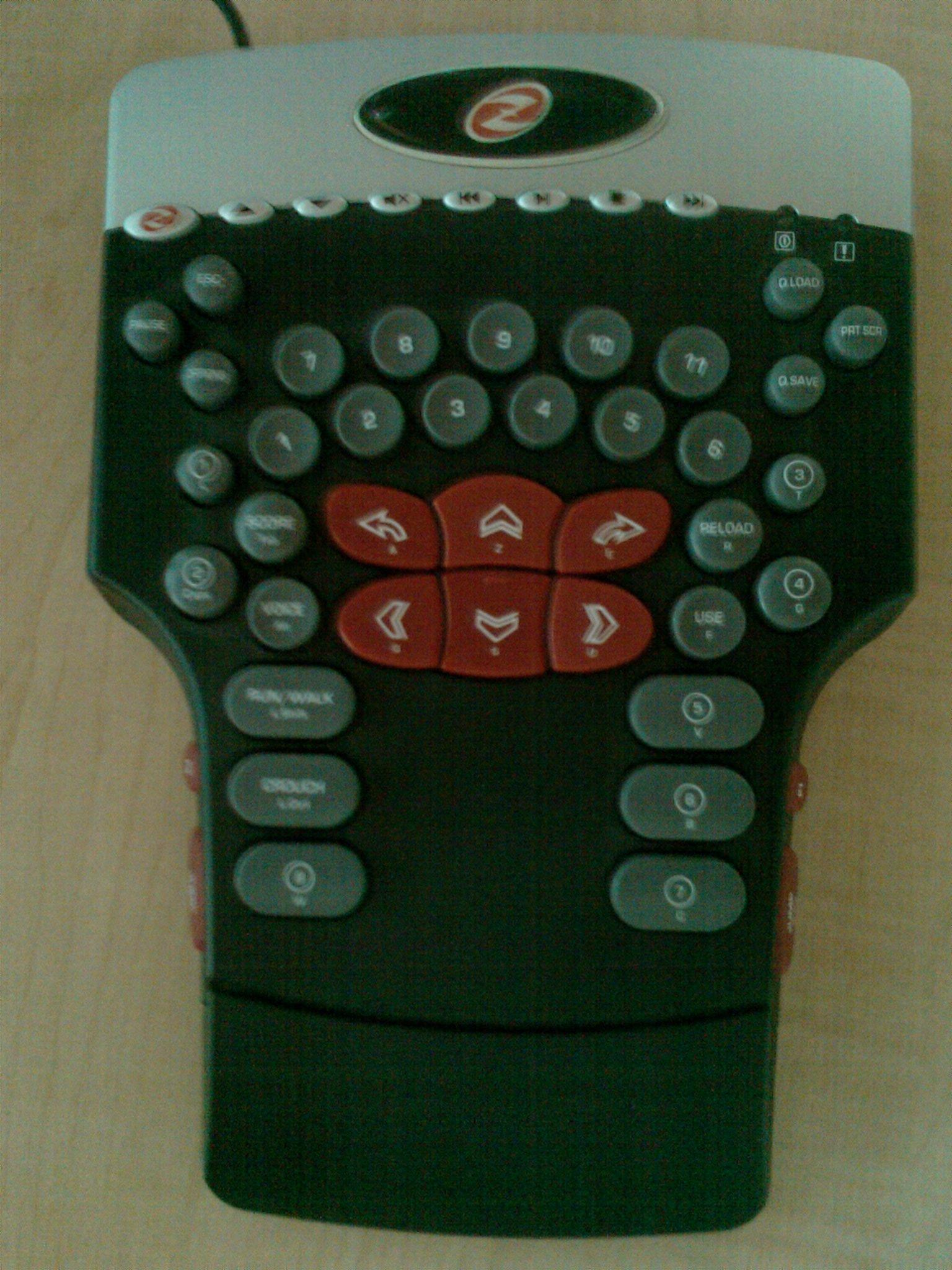 Z Fang